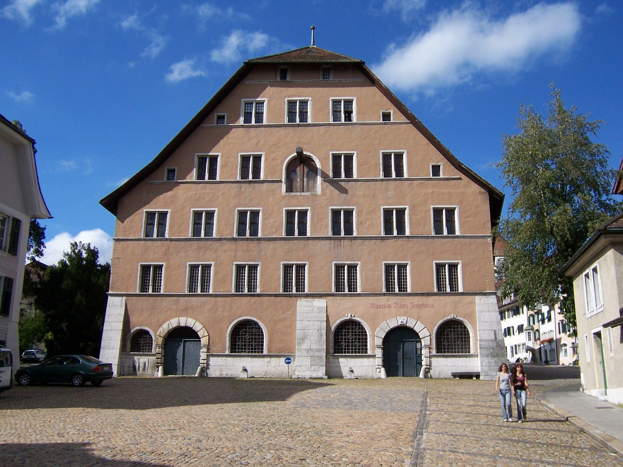 Altes Zeughaus in Solothurn (Kanton Solothurn, Schweiz) eigene Aufnahme vom 4. September 2006